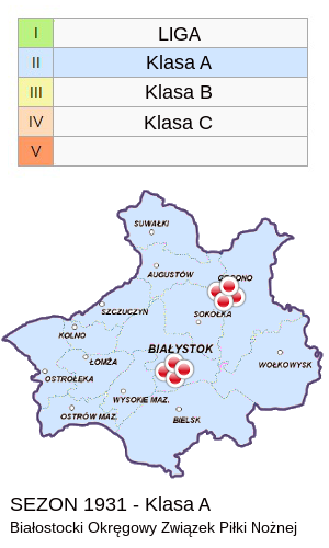 Jagiellonia w sezonie 1931 - mapa